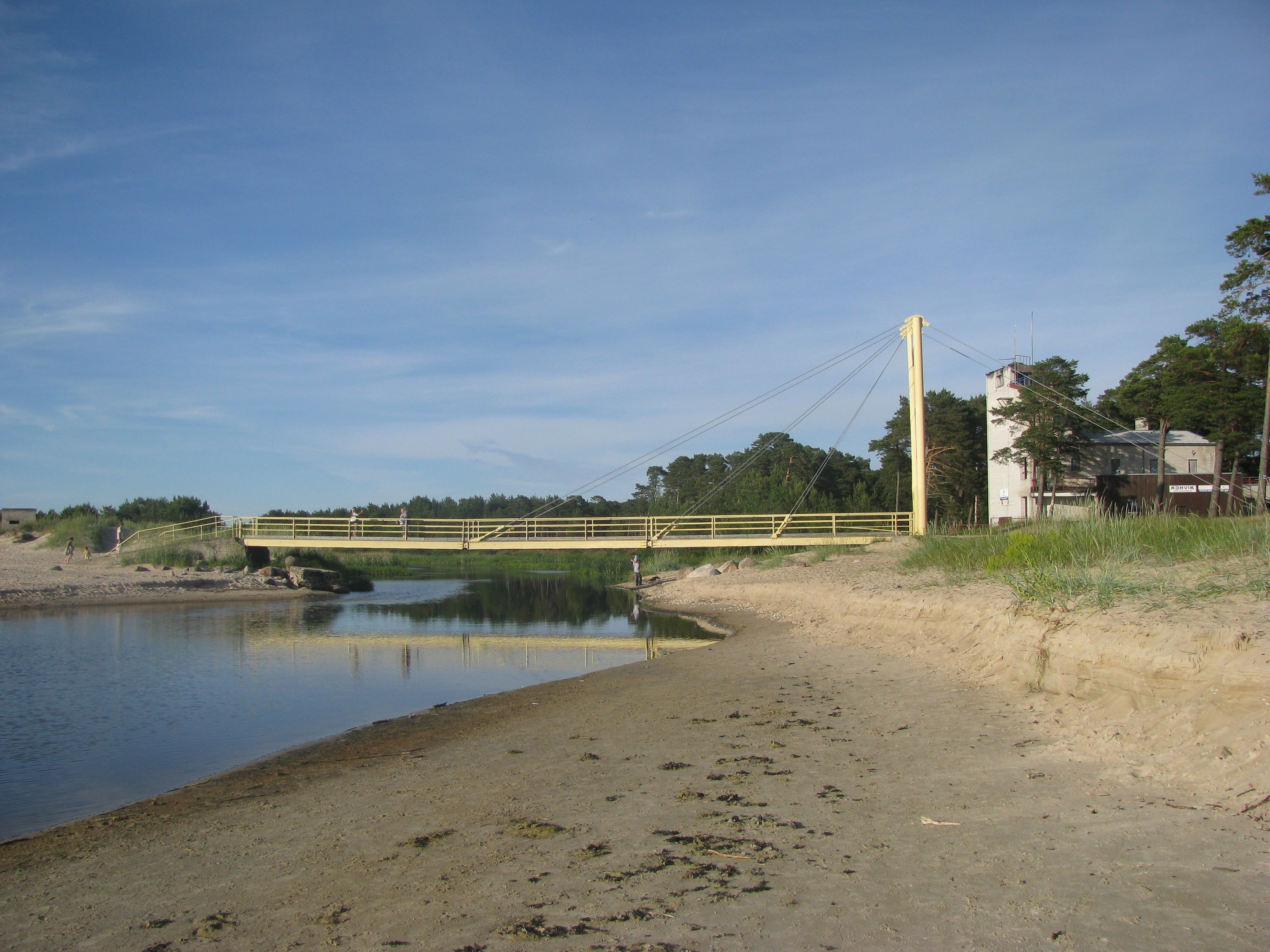 Vääna jõe suue